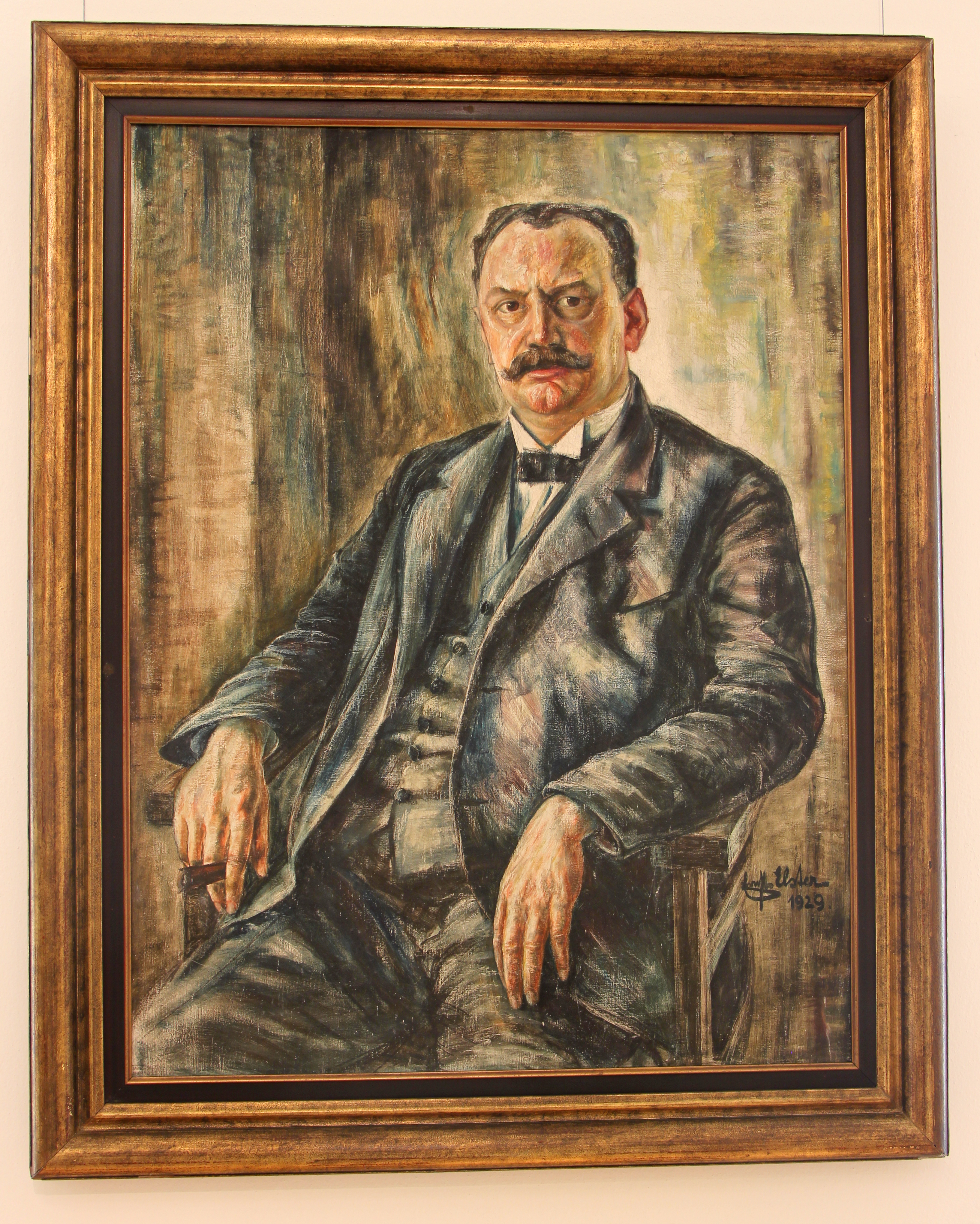 Braunschweigisches Landesmuseum. Wikimedia Deutschland. Juni 2014.